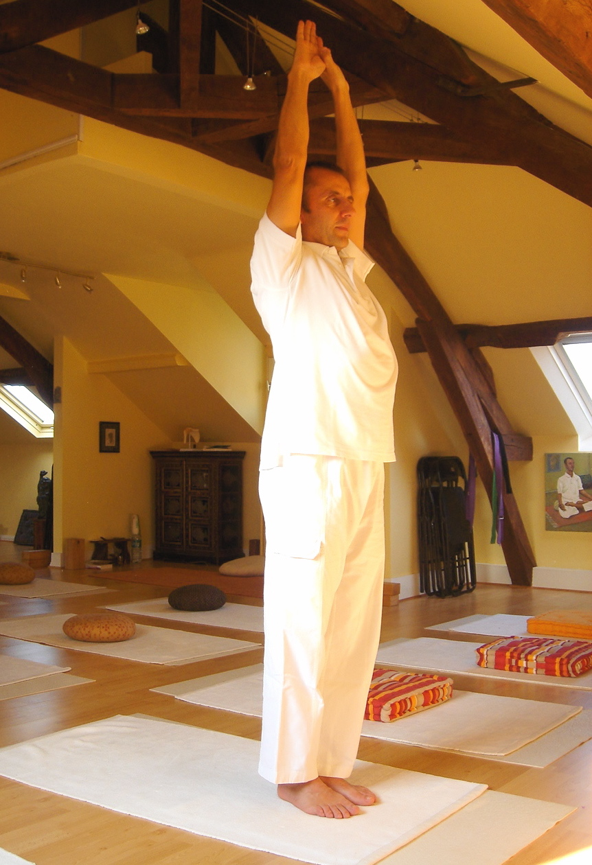 Yoga postures